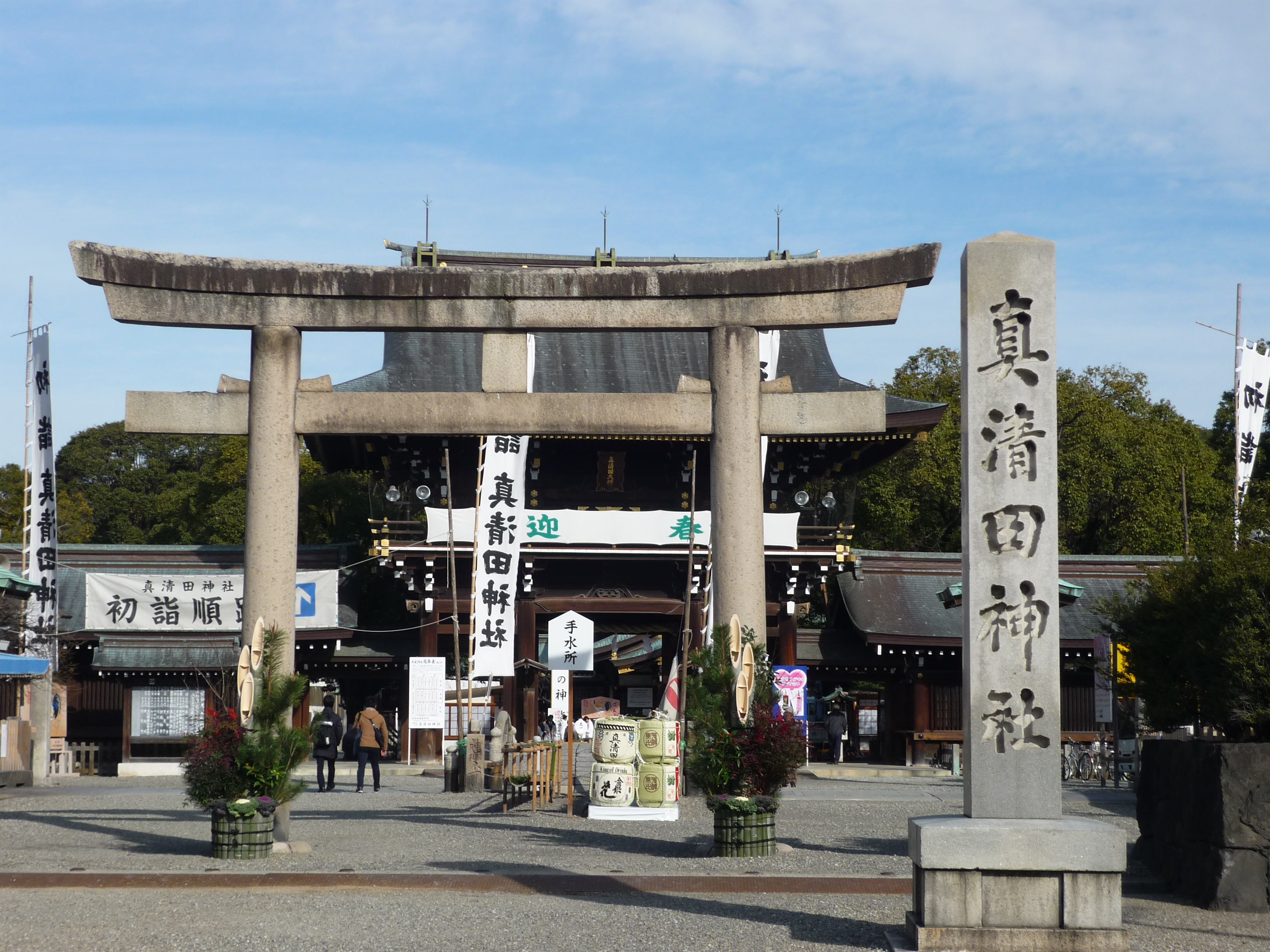 真清田神社（一宮市）の鳥居（2016年12月撮影）